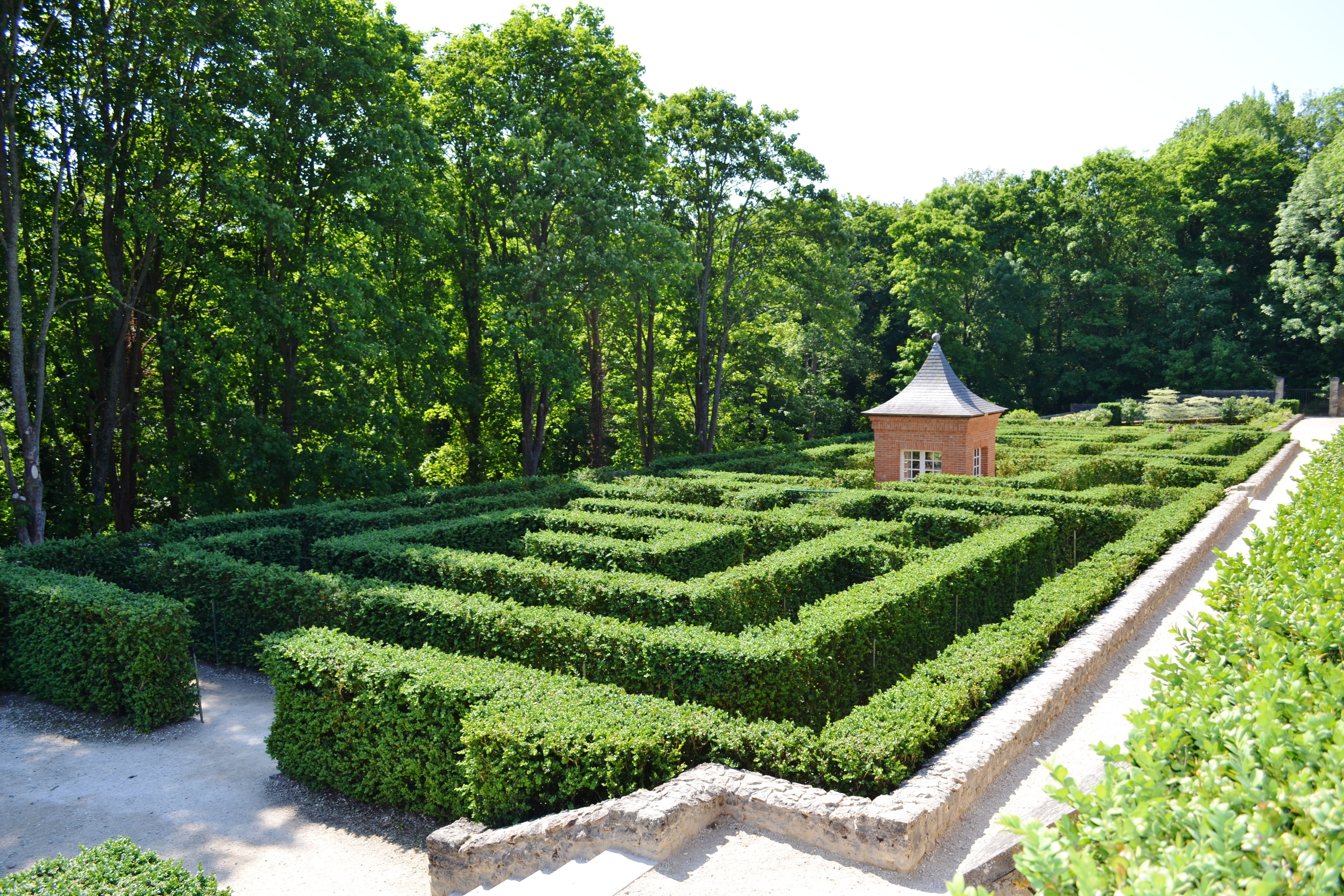 Labyrinthe aux mille buis Château de Breteuil - Les enfants seront heureux de se perdre dans le labyrinthe aux mille buis et de jouer dans l’aire de jeux proche du château.